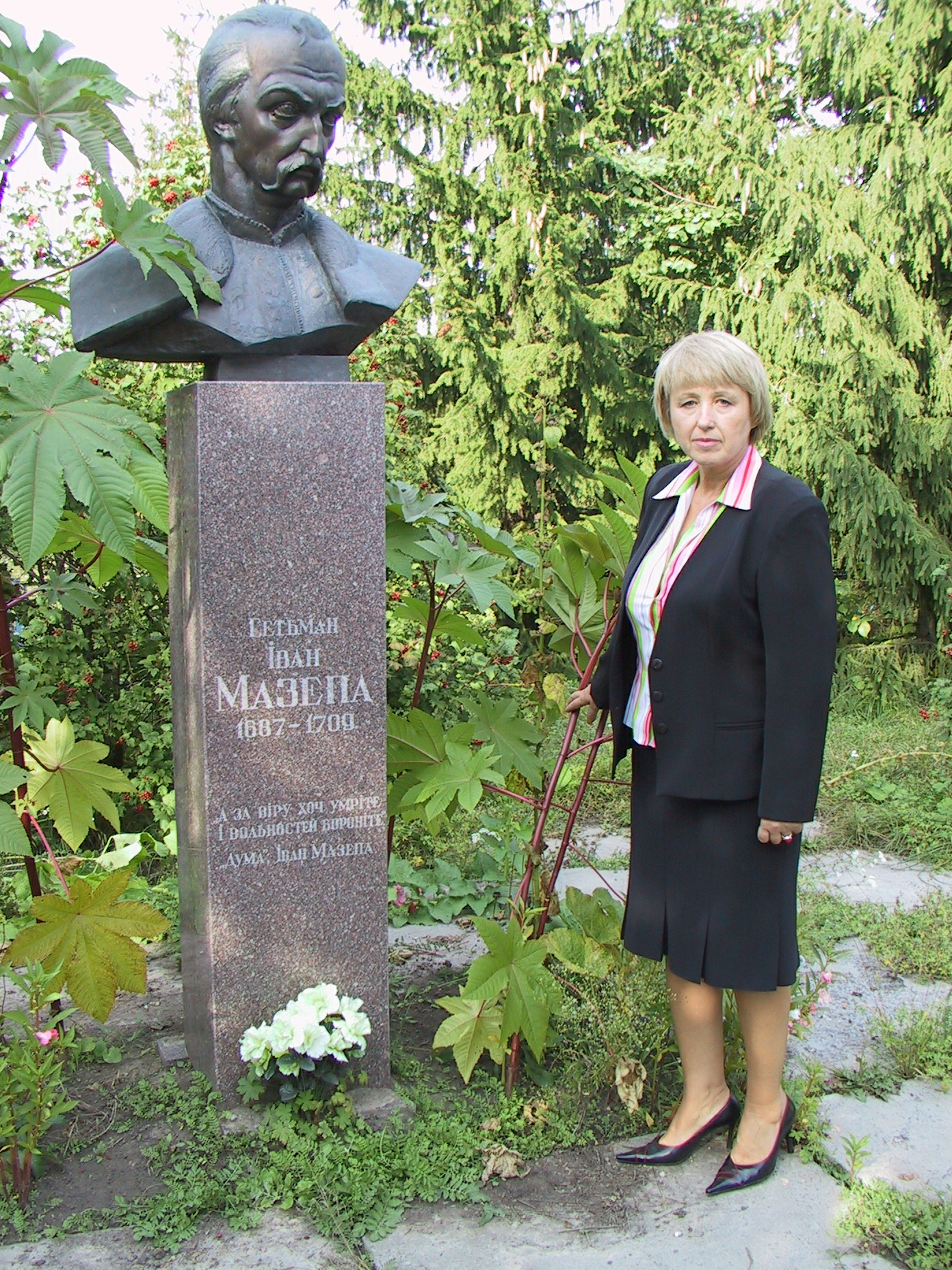 Валентина Стрілько біля пам'ятника Івану Мазепі через 15 років після його відкриття, с. Мазепинці Білоцерківського району, 2009 рік.